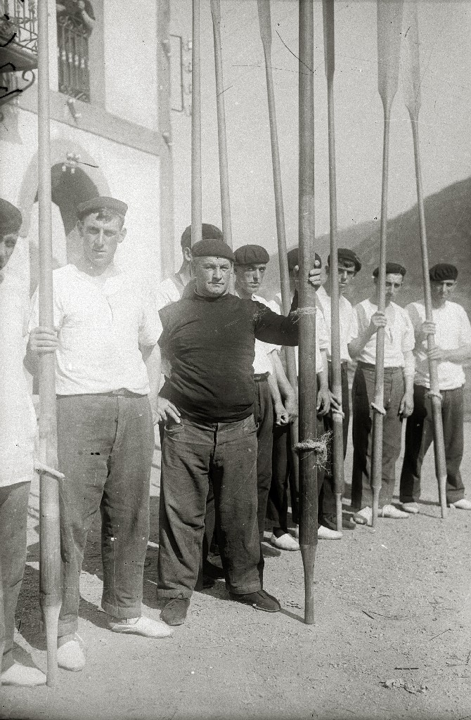 Título original: Tripulación de la trainera San Pedro 'Aita Sanpedrukua' ganadora de la Bandera de la Concha (2/3) Localización: Guipúzcoa